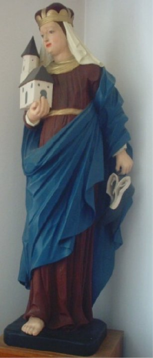 Heiligenstatue der Hedwig von Andechs aus der Kirche St. Hedwig Görlitz